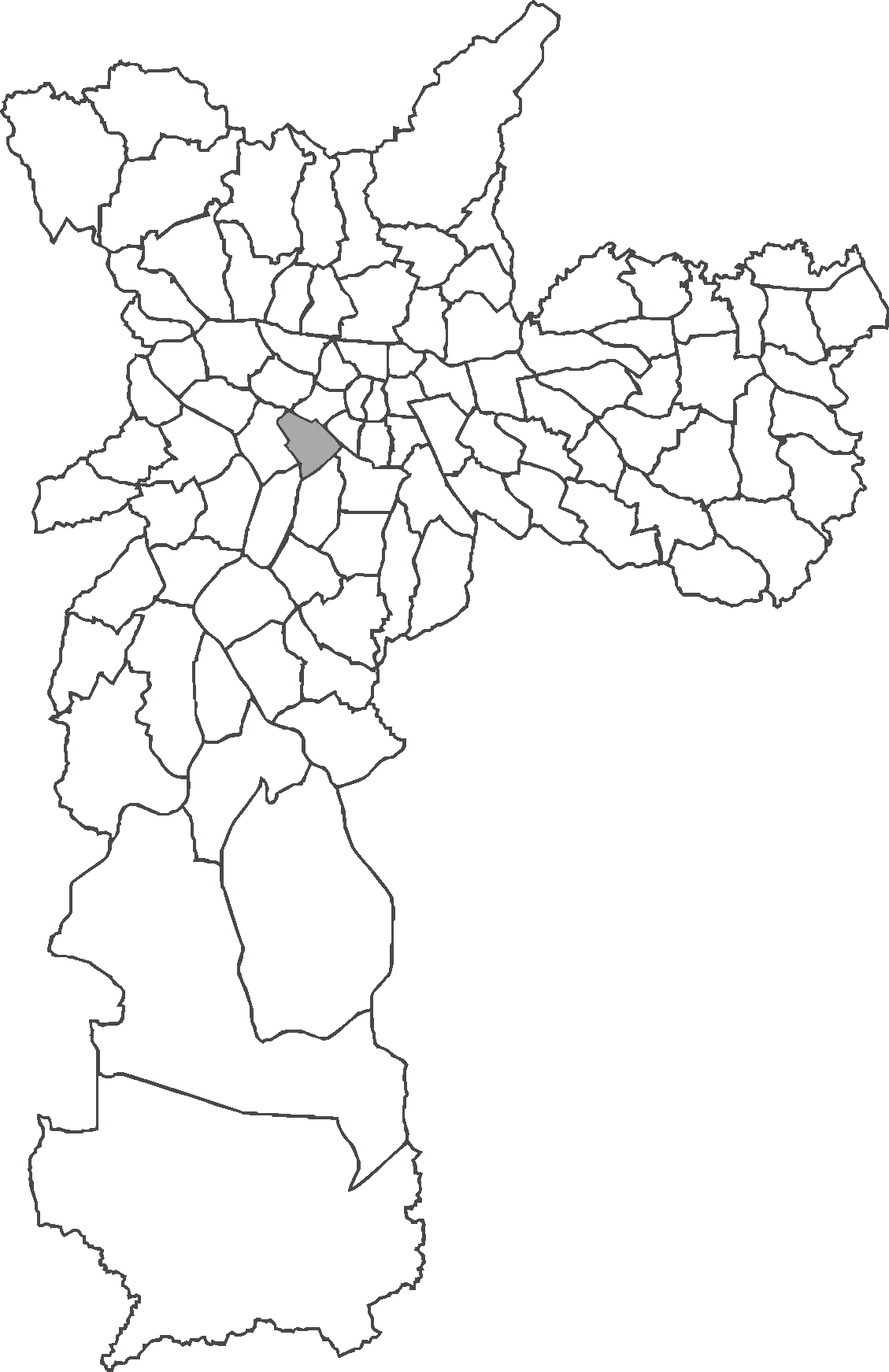 Localização do distrito do Jardim Paulista no município de São Paulo.